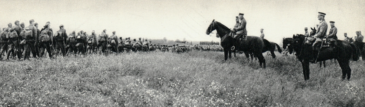 Defilada 1 pułku piechoty Legionów Polskich przed dowódcą 11 Bawarskiej Dywizji, gen. Friedrichem von Bernhardim.